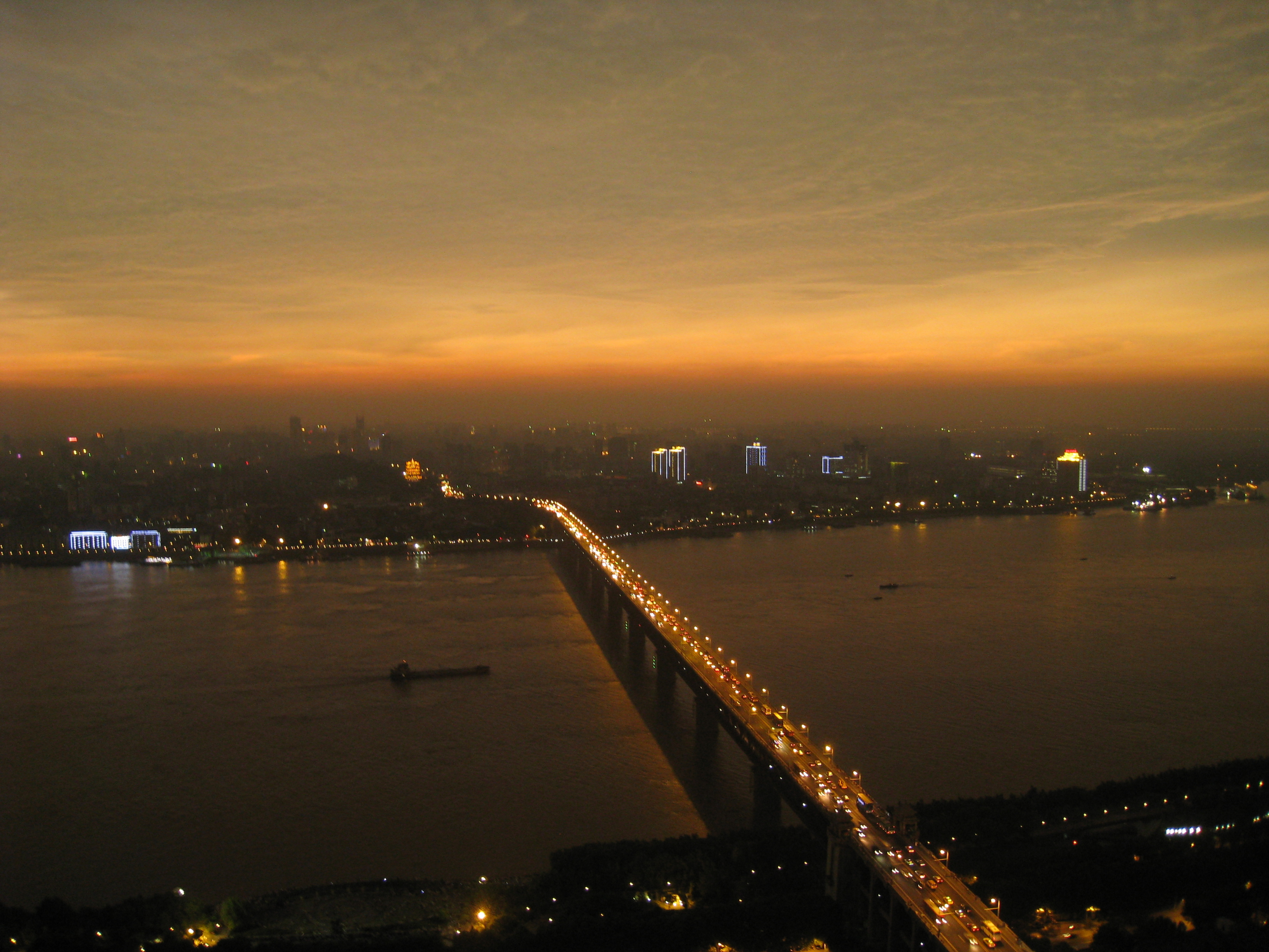 龟山 日食